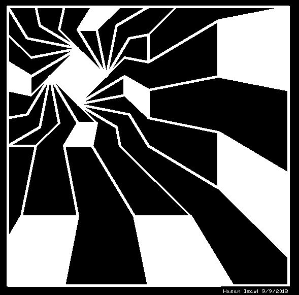 دراسة امكانية تطوير نمط هندسي (Figure Ground ) من خلال تقنية الشكل والخلفية رابط المدونة